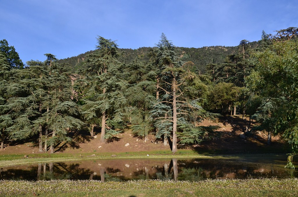 le parc national de la foret des cèdres de Theniet el had Algerie